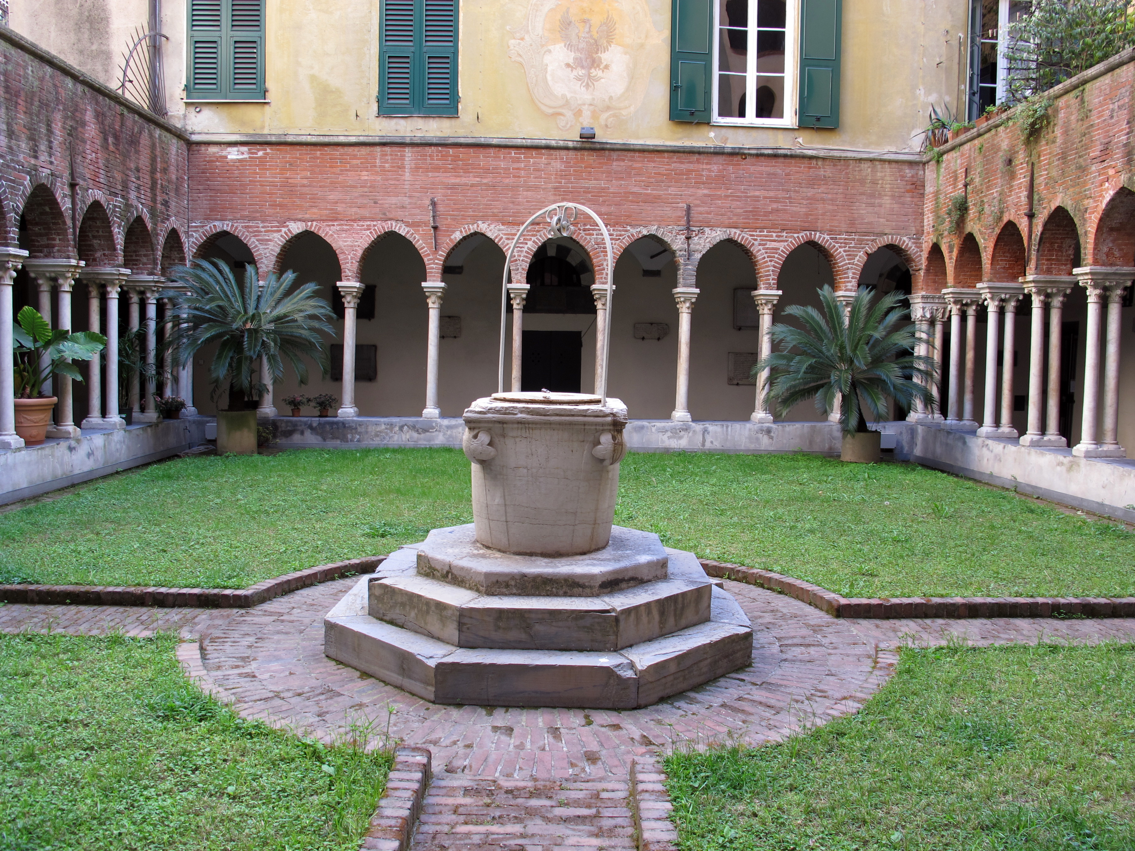 San Matteo (Genova)